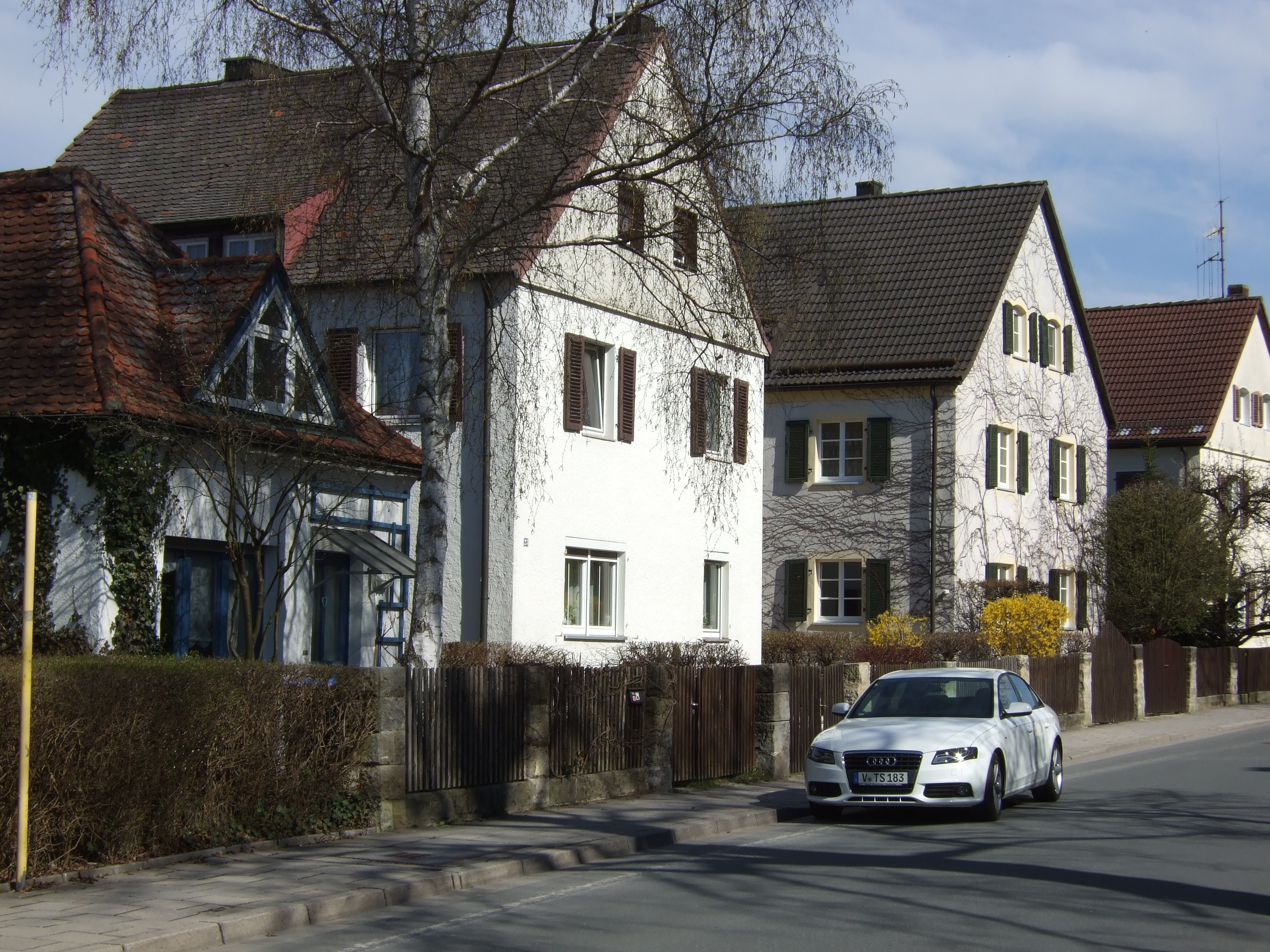 Einzelhäuser in Bayreuth Hegelstraße